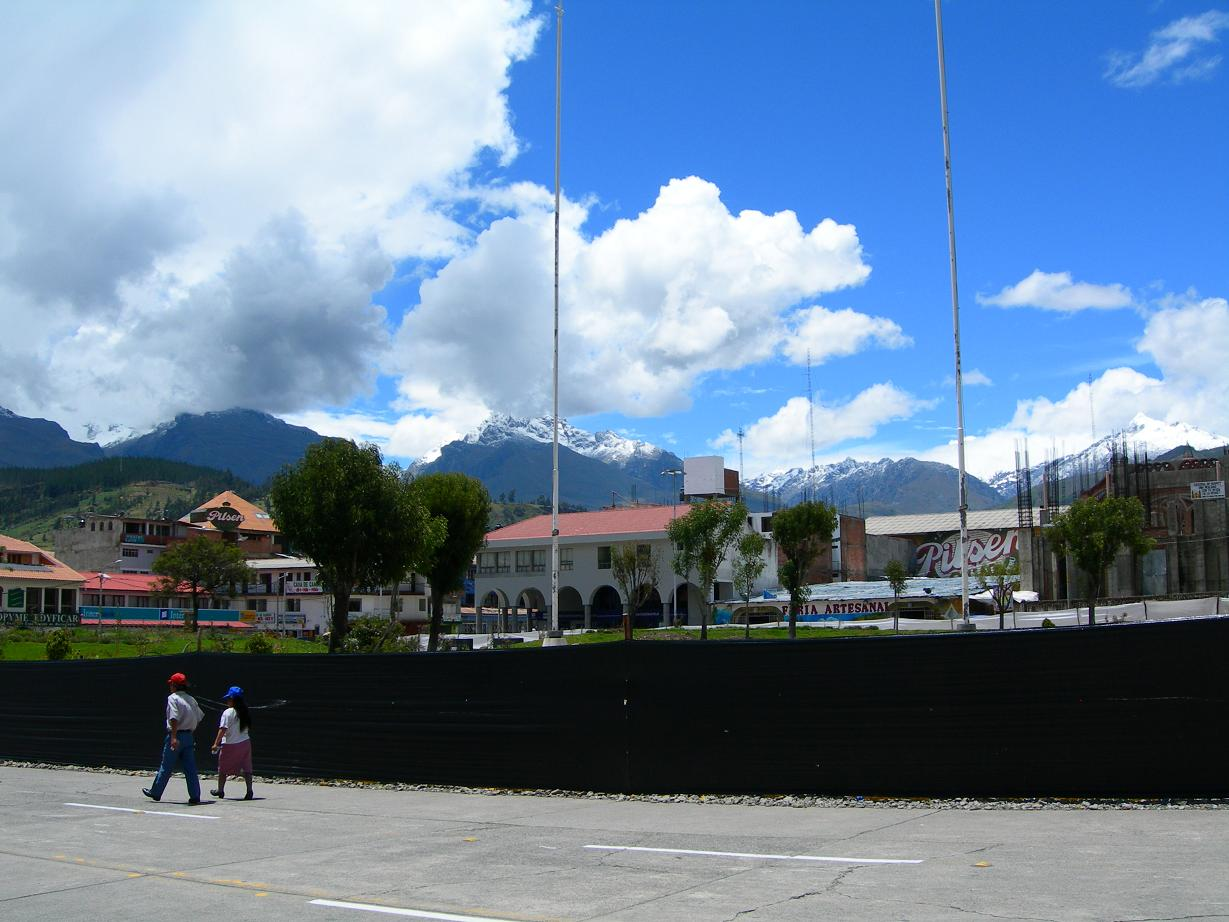 Plaza de armas de Huaraz con los nevados de la cordillera blanca al fondo.